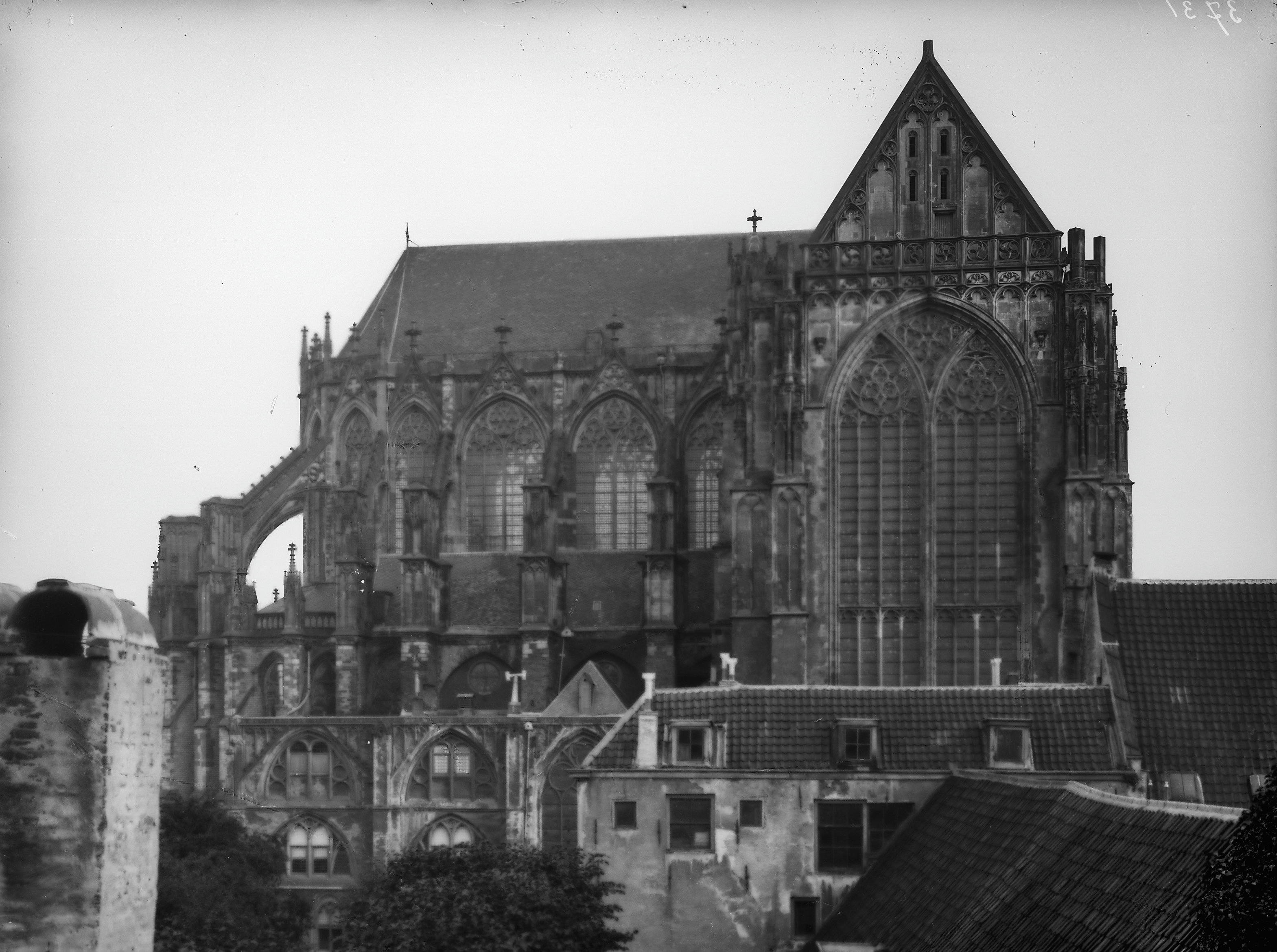 Domkerk, Uitwendig: Dom vanuit het noorden